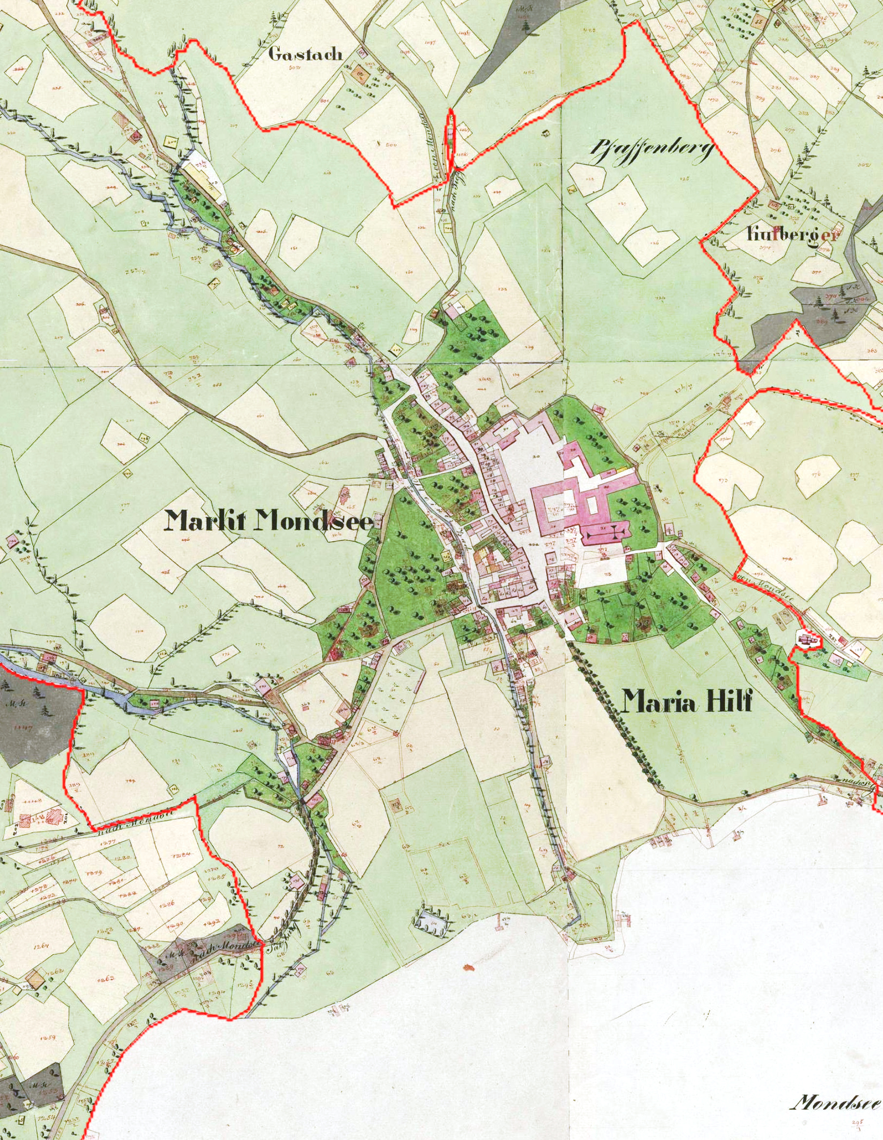 Katasterplan vom Ort Mondsee, ca. 1823 bis 1830